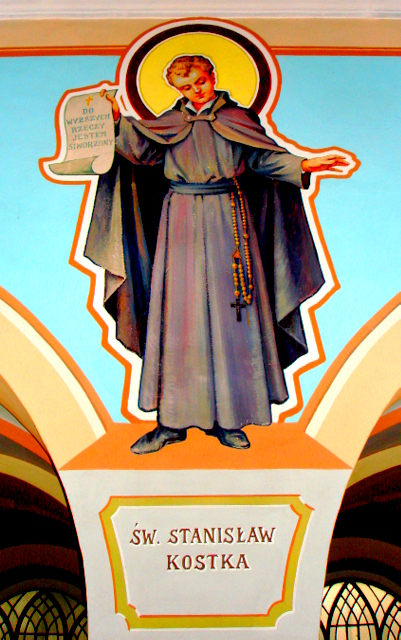 Kamienna Góra, kościół pw. śś Apostołów Piotra i Pawła, fresk autorstwa Jana Molgi